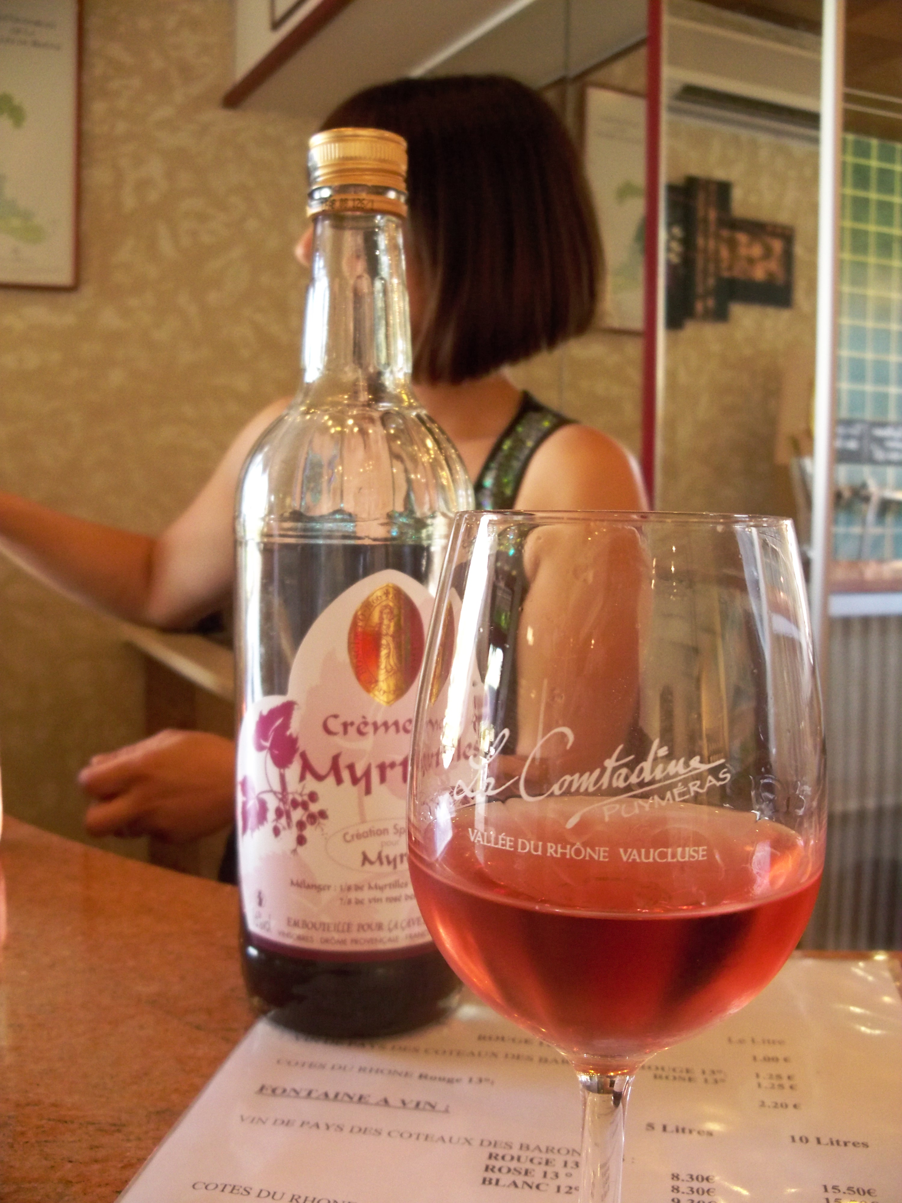 Myro : Crème de myrtilles au vin rosé de Puyméras, Vaucluse